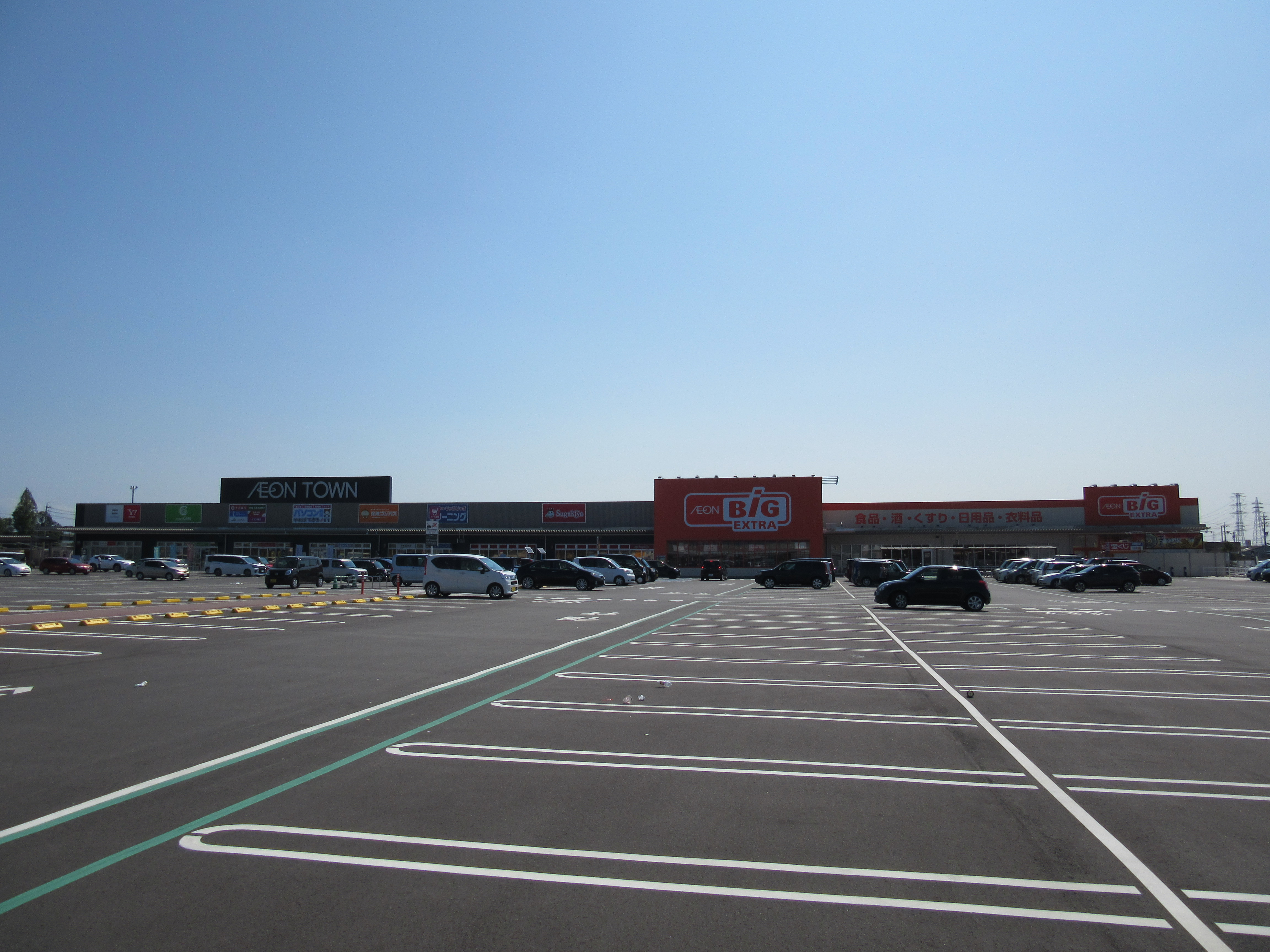 イオンタウン本巣